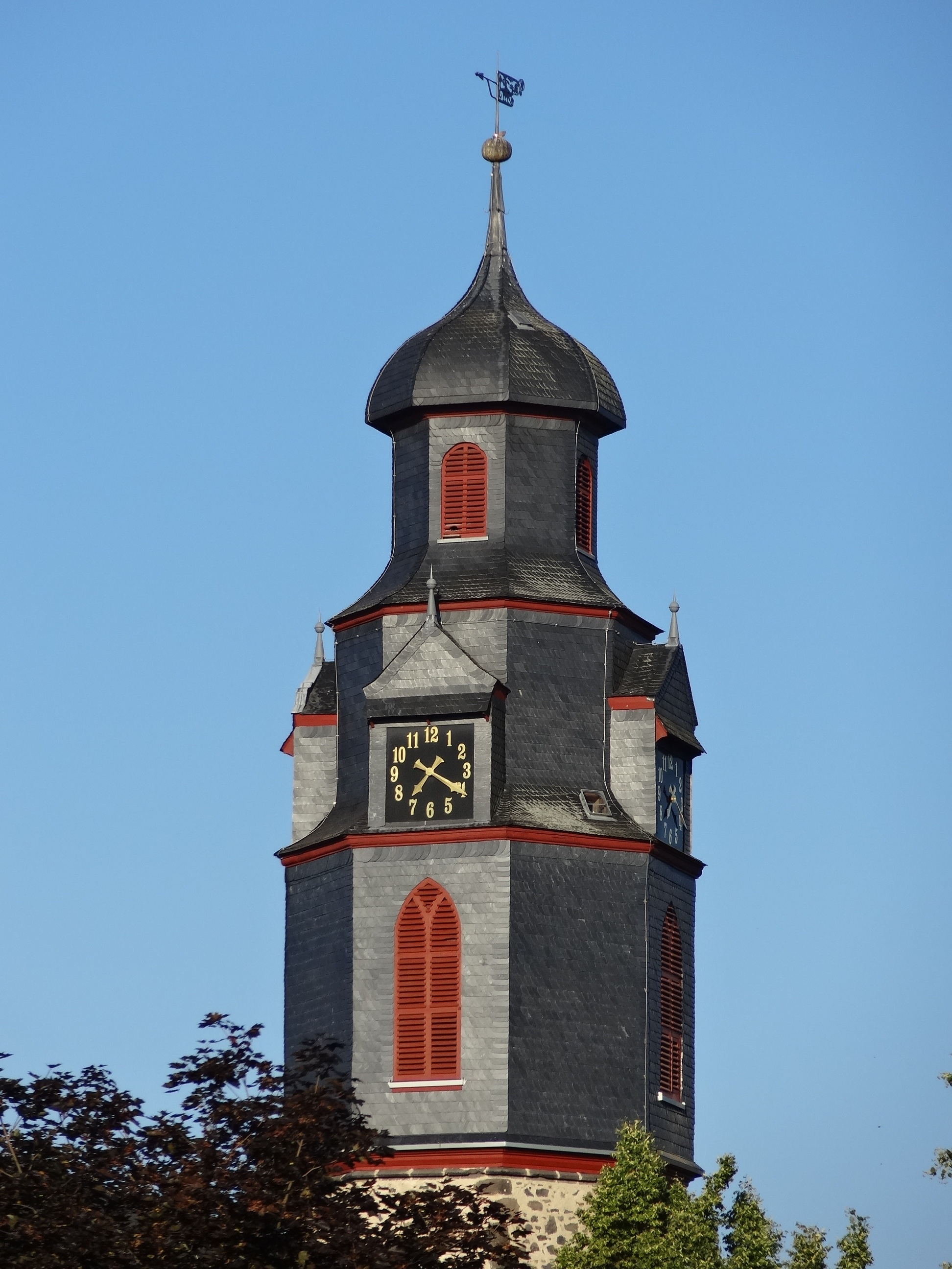 Exterior of Markuskirche (Butzbach)